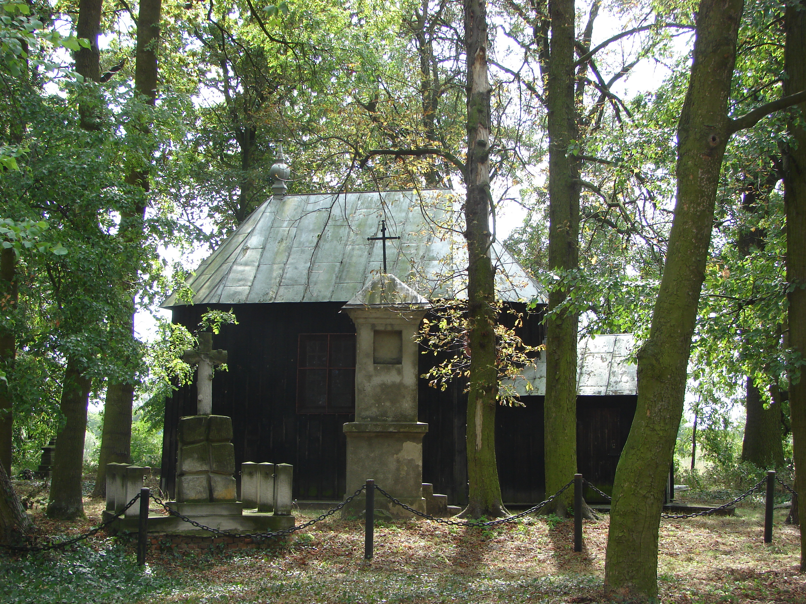 Sompolno, powiat koniński, Kaplica św. Hieronima, XVII wiek